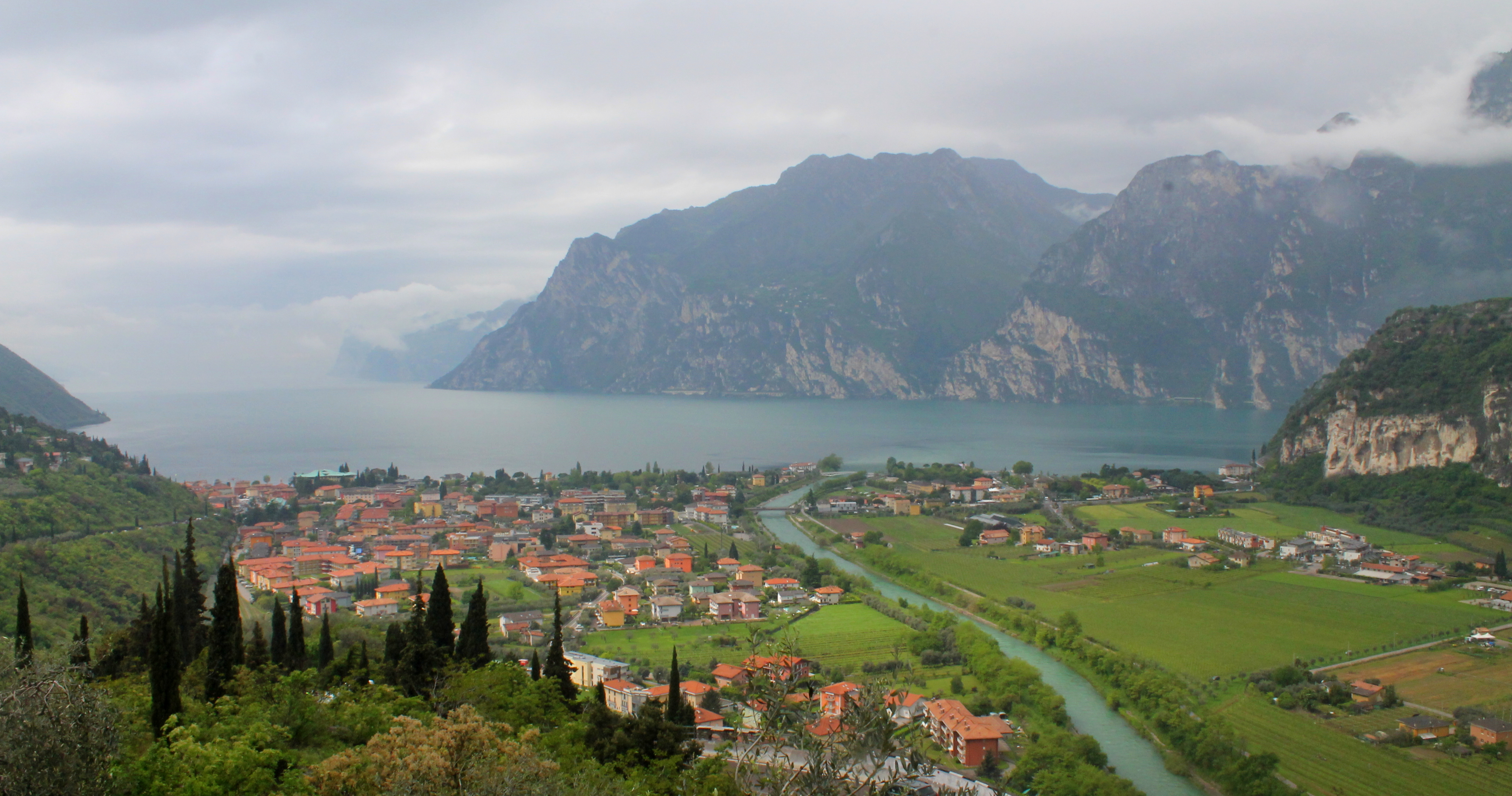 Riva del Garda view with Lake Garda on the background